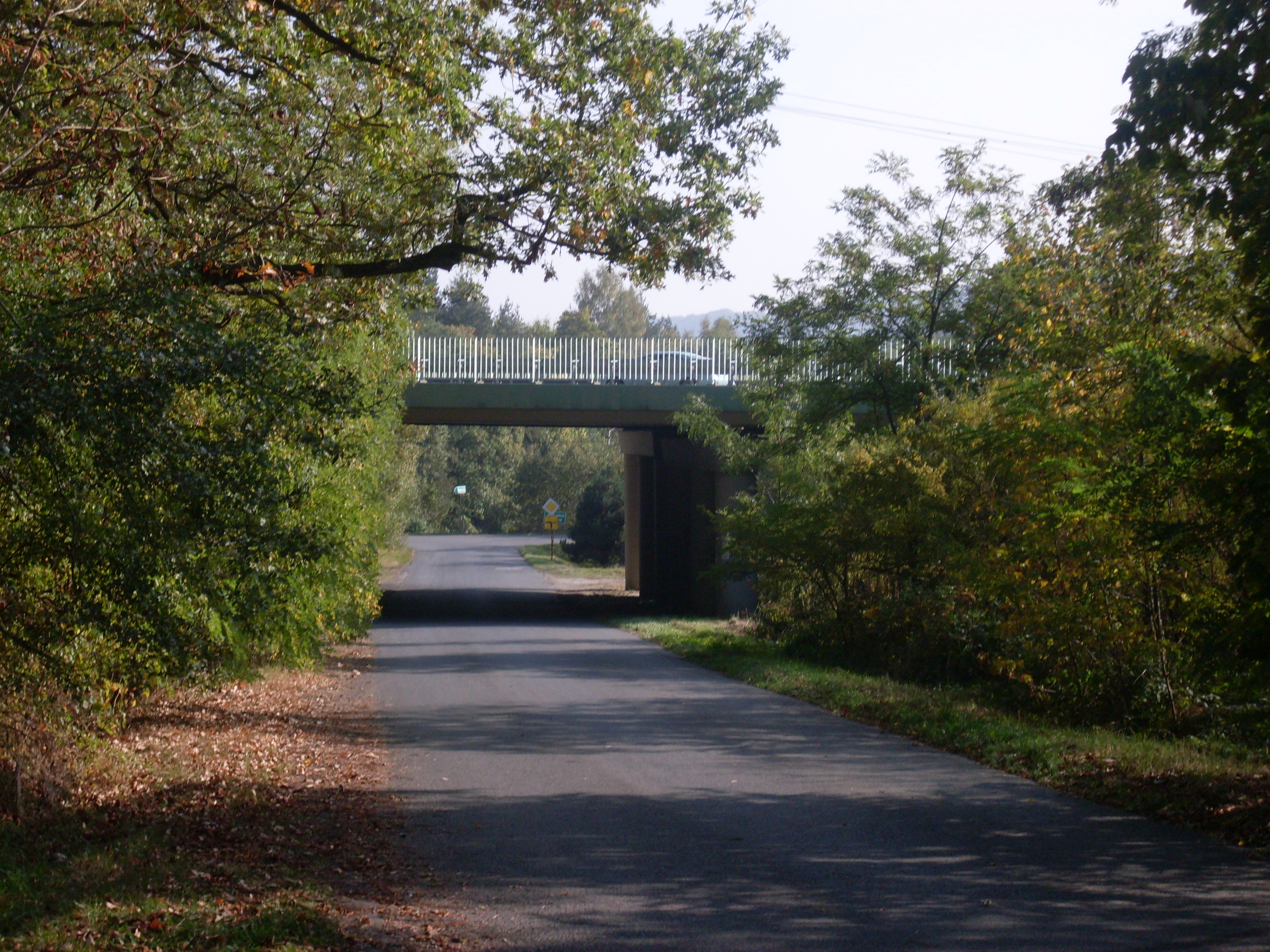 Wiadukt pod A4 (Frywałd-Kopce)woj. małopolskie